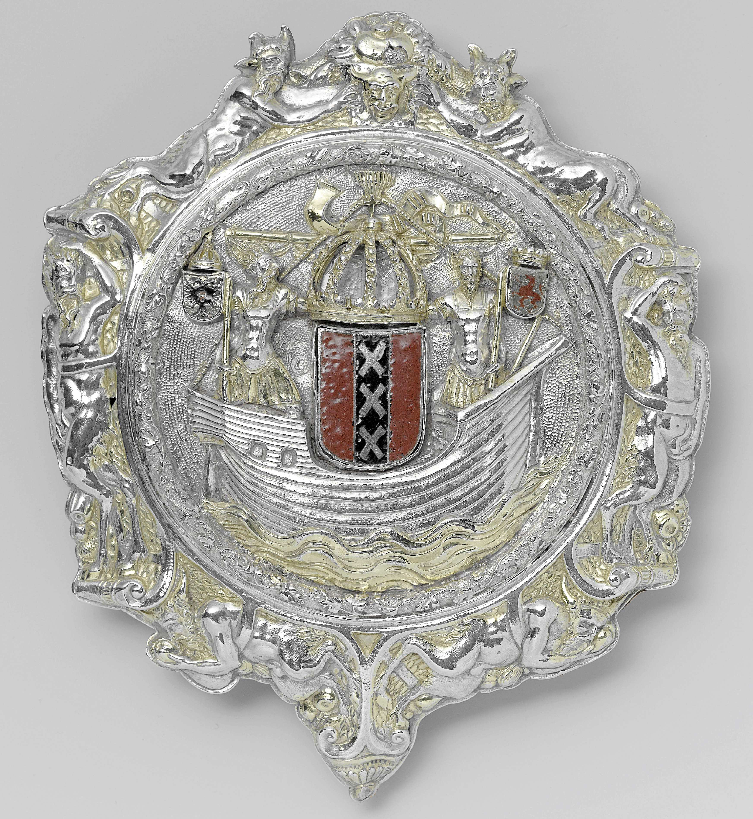 Bodebus van de stad Amsterdam. Op een ronde plaat, omgeven door een bolle, met wijnranken gedreven lijst, is het stadszegel van Amsterdam weergegeven tegen een geponste achtergrond. Het gekroonde wapen van Amsterdam rust tegen de mast van een door golven gedragen koggeschip. Het wordt geflankeerd door twee gebaarde krijgers in Romeinse wapenrusting, die elk een staf met daaraan een gekroond wapenschild vasthouden; het linker vertoont het keizerlijke wapen, het rechter het wapen van Holland. De drie wapens zijn geëmailleerd in rood en zwart. Naast het wapen van Amsterdam is een kleine gebaarde figuur te zien, die uit het vooronder naar boven kijkt. De plaat is gevat in een omlijsting met zes satyrs. De bovenste twee houden een met een monsterkop versierd voorwerp vast, dat gevuld is met een granaatappel, andere vruchten en horens. De overige vier satyrs zijn ingeklemd in omkrullend rolwerk. De onderste twee koesteren elk een vrucht. De omlijsting heeft een geponste grond en is op enkele plaatsen gedreven met vruchten. Zij wordt aan de onderzijde afgesloten door een motief met knorren. Zowel de plaat als de omlijsting zijn gedeeltelijk verguld. Het licht convexe voorwerp is bevestigd op een vlakke roodkoperen achterplaat met in het midden een groot rond gat, aan de onderzijde een rond oog en aan de bovenzijde de aanzet van een thans afgebroken haak. In de achterzijde van de zilveren plaat is een W gegrift.